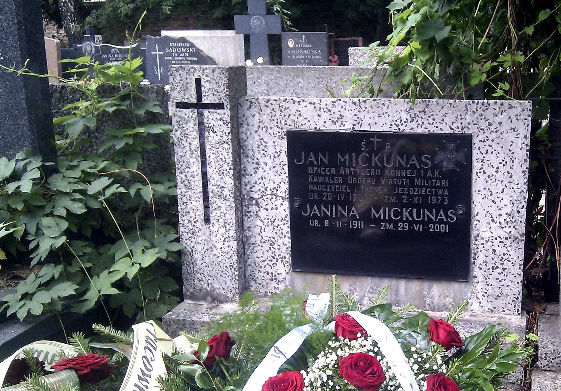 Mogiła na Starych Powązkach w Warszawie